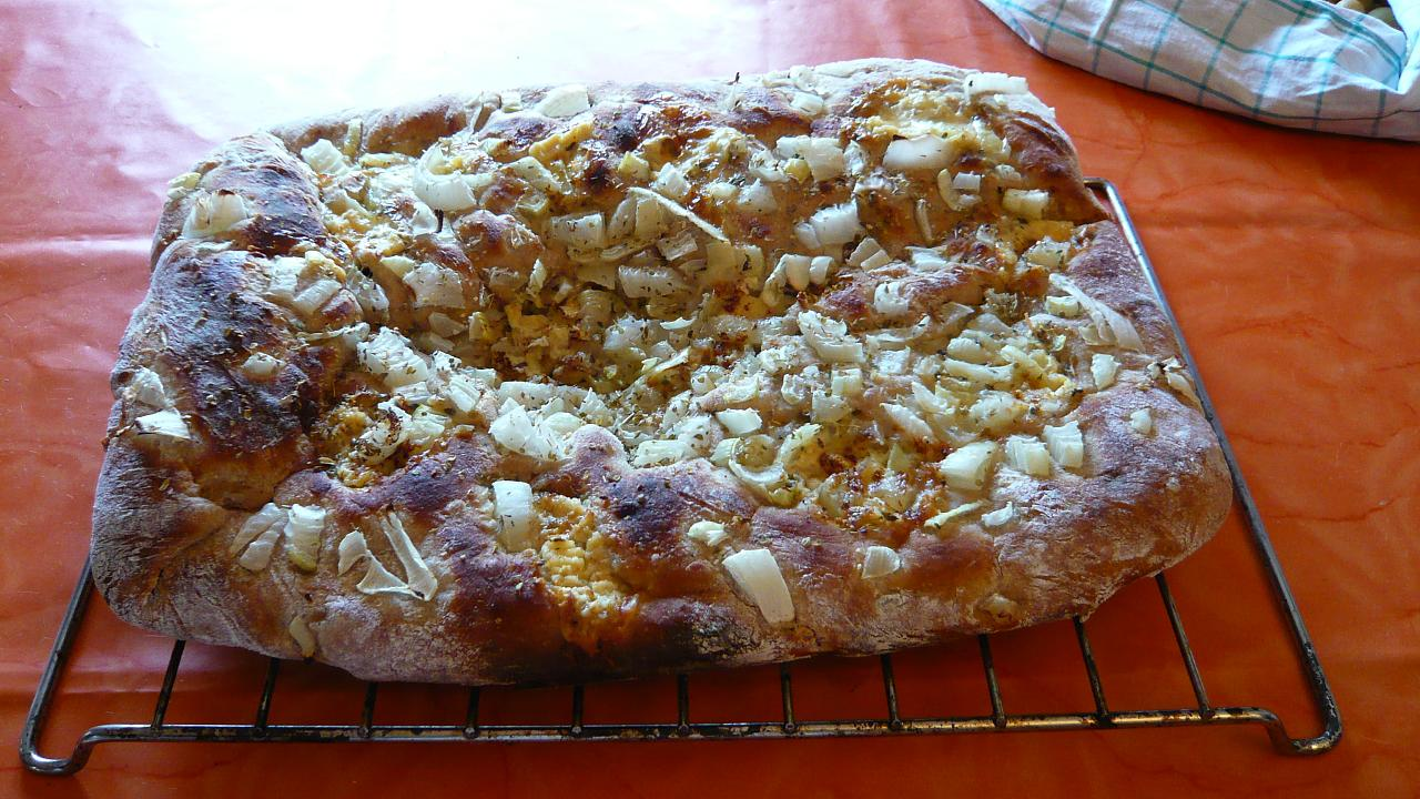 Fougasse aux olives et oignons et coriandre